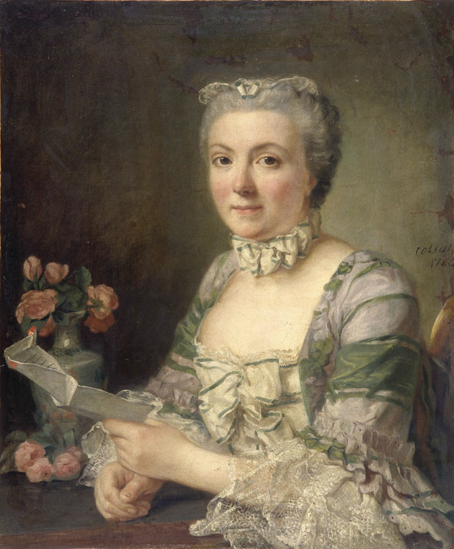 Madame Véron de Forbonnais, née Marie-Sophie Le Ray de Chaumont